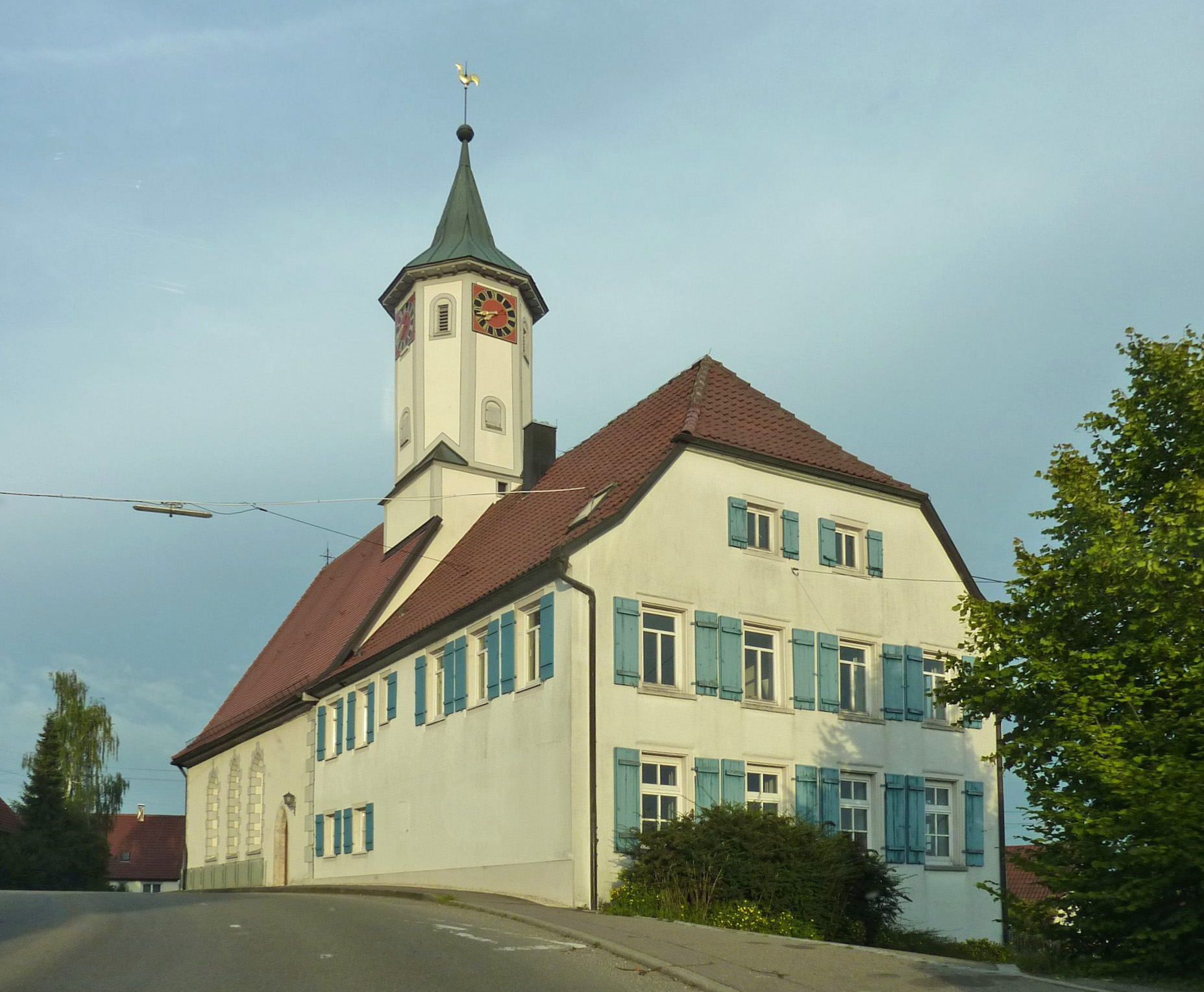 Evangelische Georgskirche in Dottingen (Stadt Münsingen) auf der Schwäbischen Alb